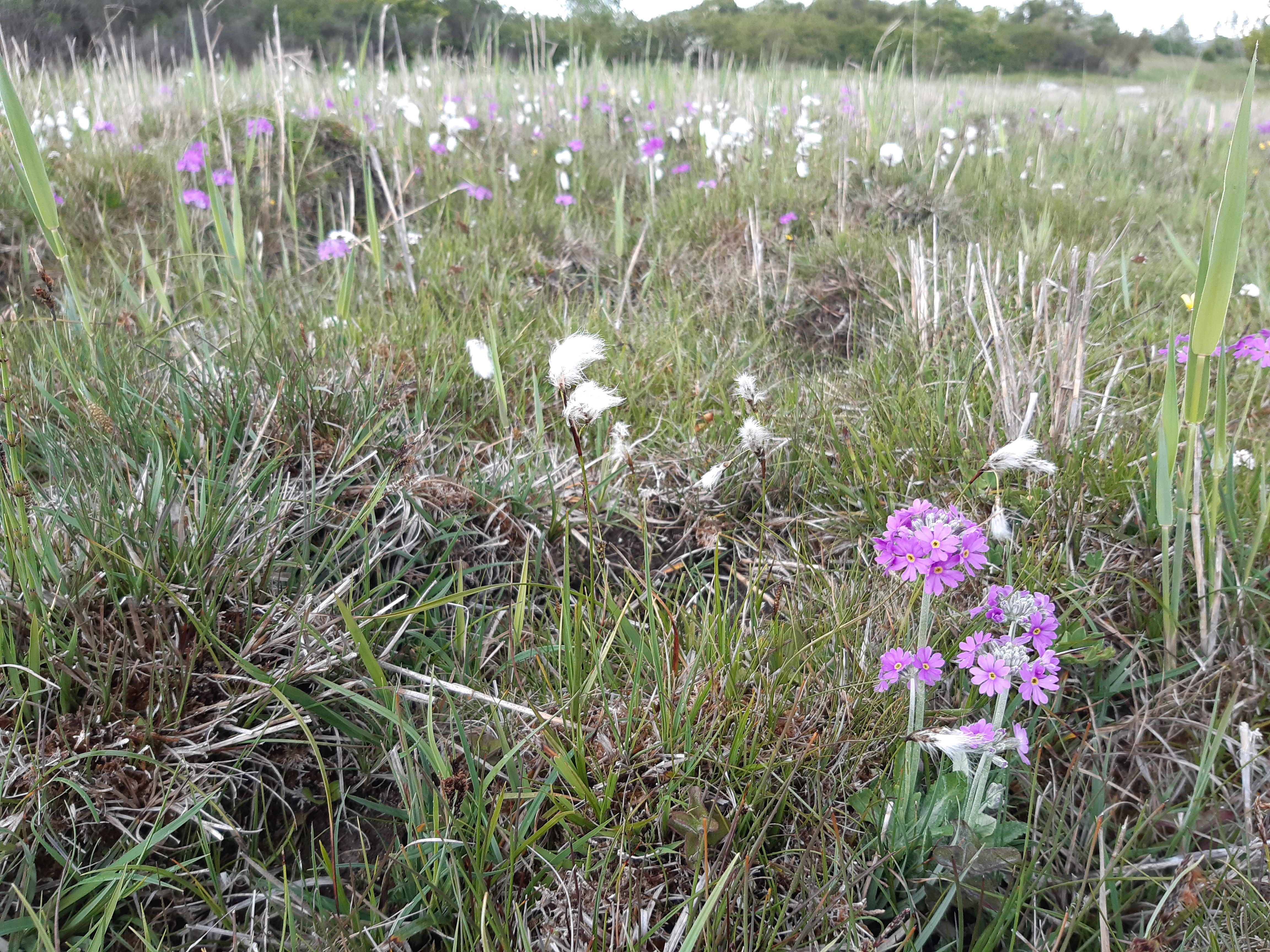 Majvivor och ängsull i kärret på Simris strandäng